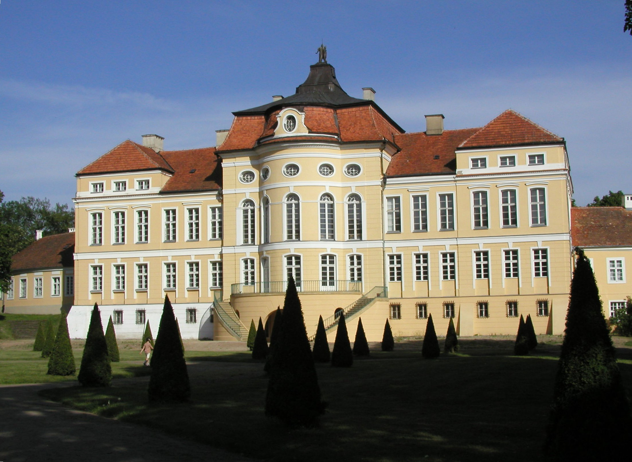 Rogalin. Pałac od strony parku. Zdjęcie zrobione własnoręcznie w czasie wycieczki do Rogalina wiosną (maj)2003 r.